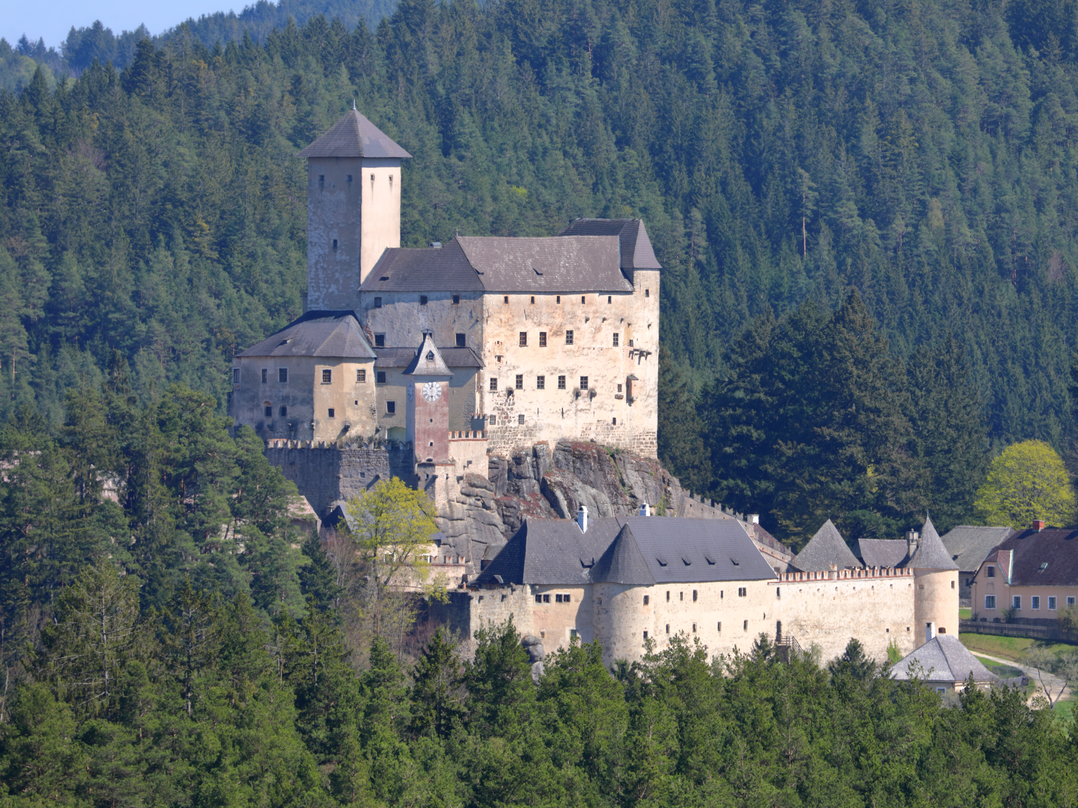 Westnordwestansicht der Burg Rappottenstein im westlichen Waldviertel und auf dem Gemeindegebiet der niederösterreichischen Marktgemeinde Rappottenstein.Die bedeutende Burganlage des 12. Jahrhunderts wurde nie erobert und von den Kuenringer errichtet. Nach mehreren Besitzerwechsel kam sie 1664 durch Kauf an die heutigen Besitzer, die Grafen von Abensperg und Traun.